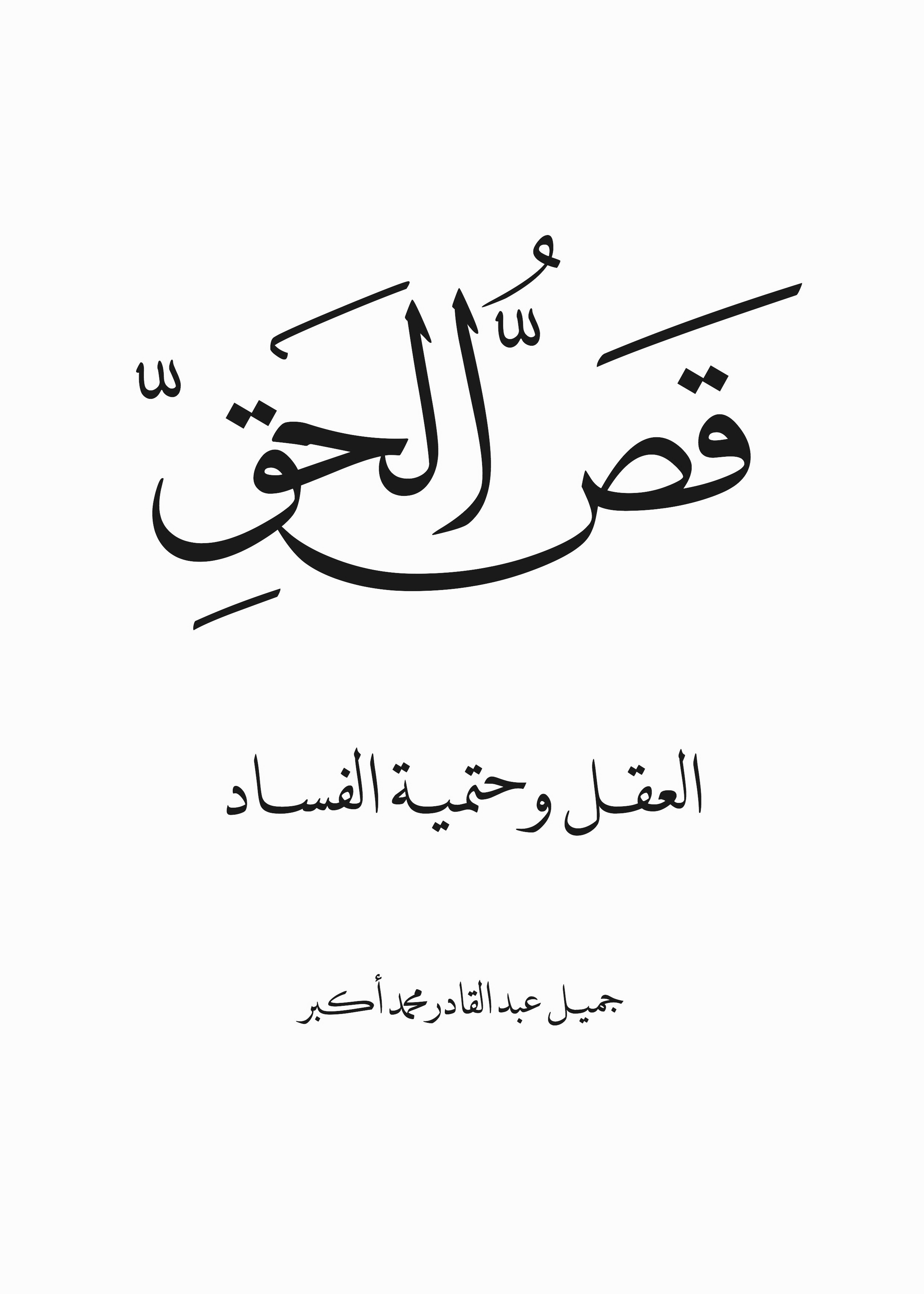 Qas al-Haq